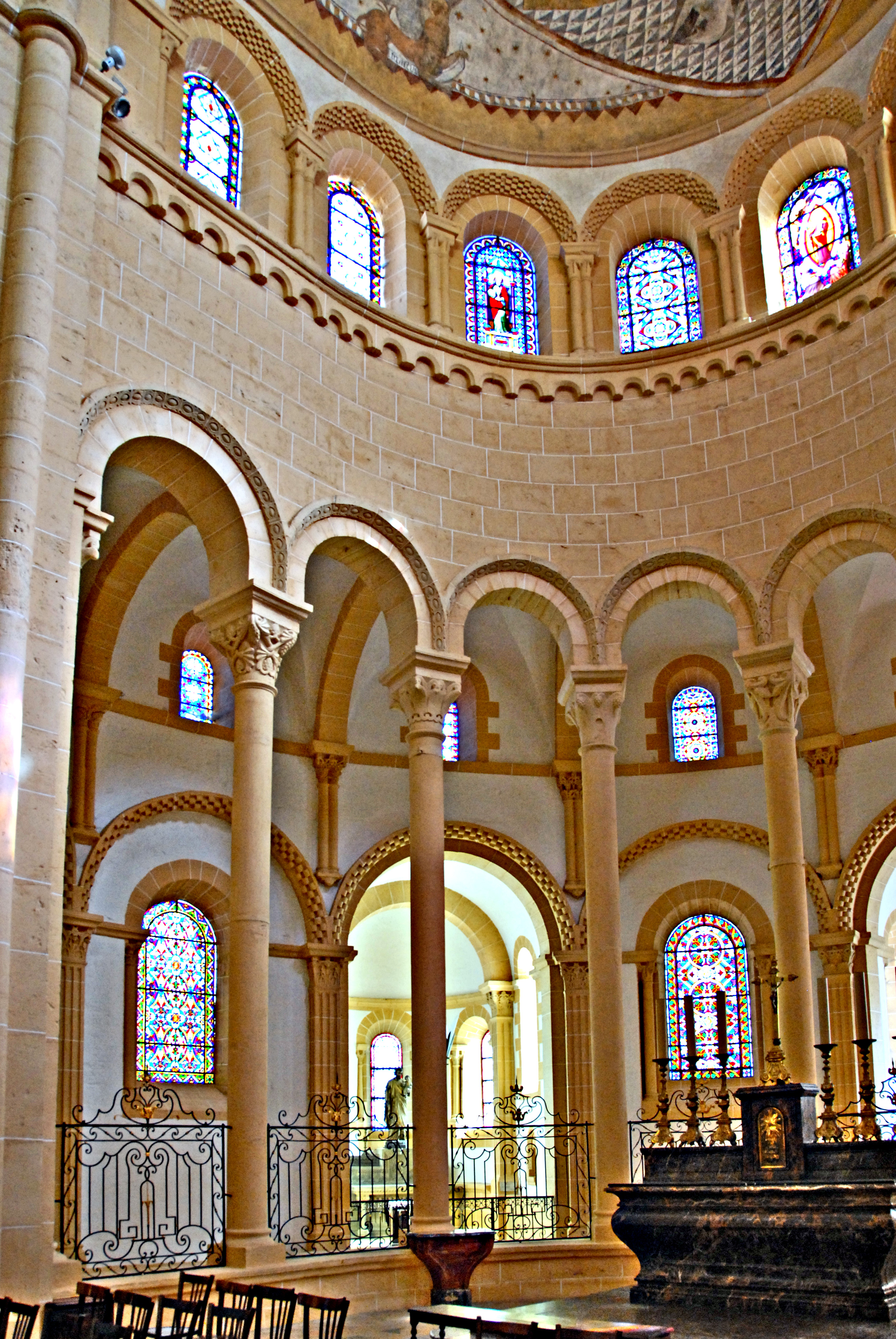 Chorapsis mit Umgang, nördl. Hälfte